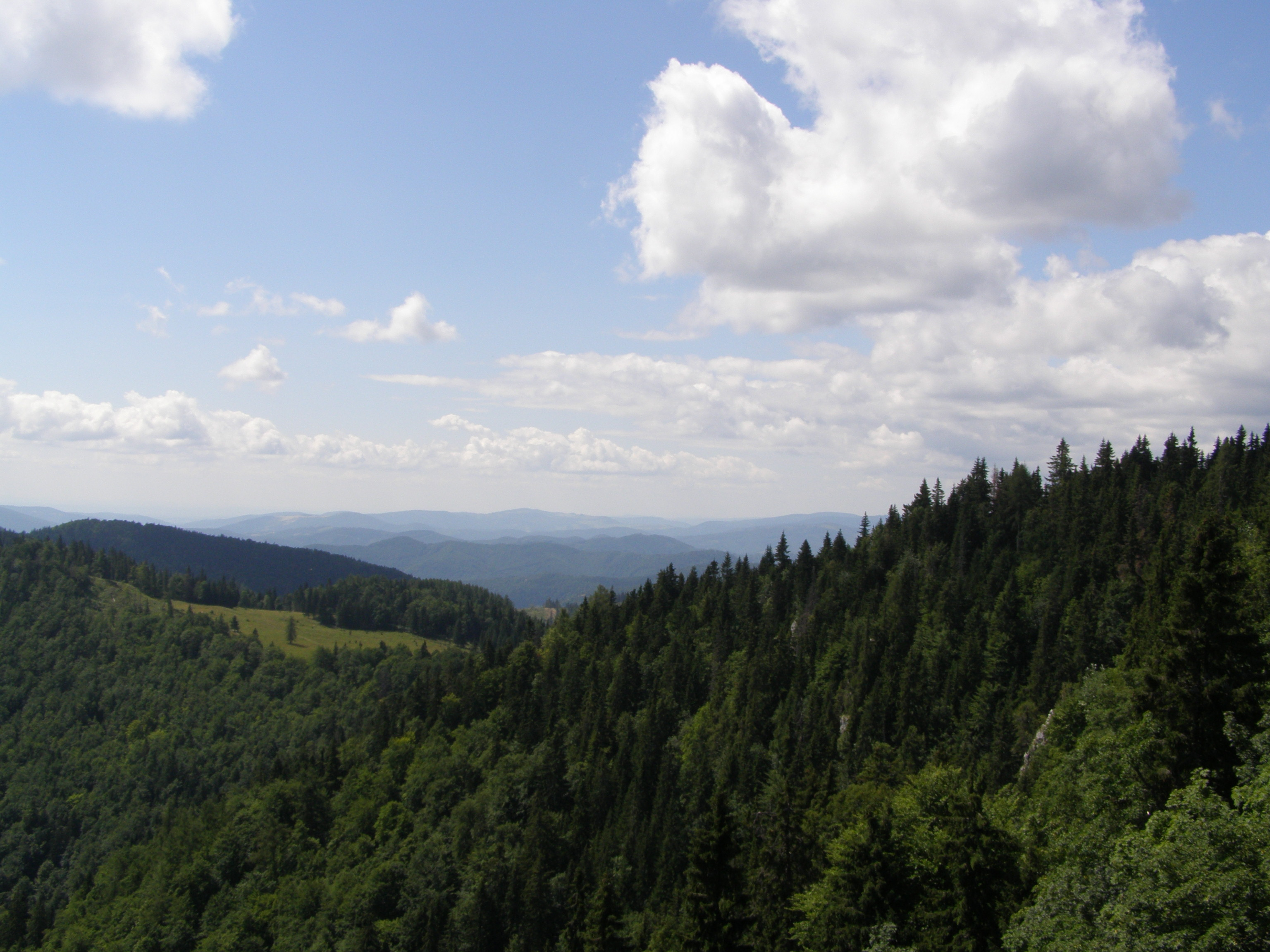 Slovenské rudohoří, Spišsko-gemerský kras, Muráňská planina, pohled z jižního úbočí vrcholu Kľak (1409 m) na jihozápad, vlevo travnaté sedlo Nižná Kľaková